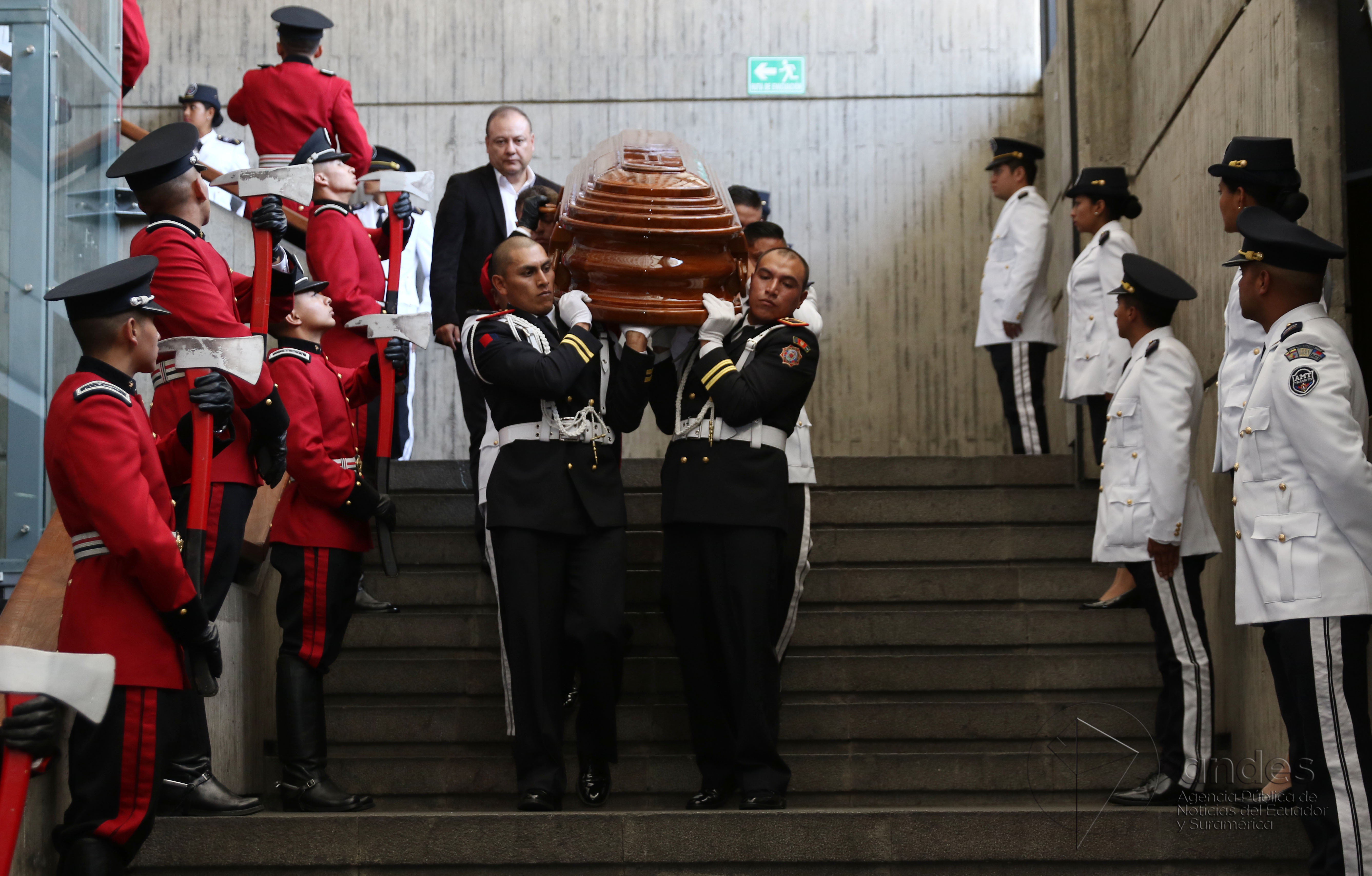 Quito, 16 nov (Andes).- Sepelio del ex presidente de la República Sixto Durán Ballén en el Salón de la Ciudad. ANDES/Micaela Ayala V.